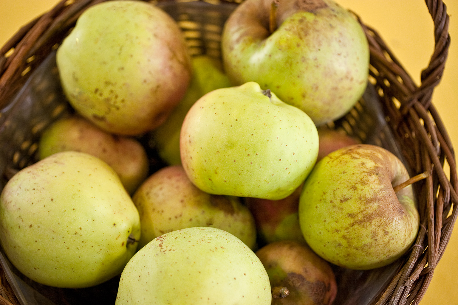 Der Gelbe Bellefleur ist eine Apfelsorte